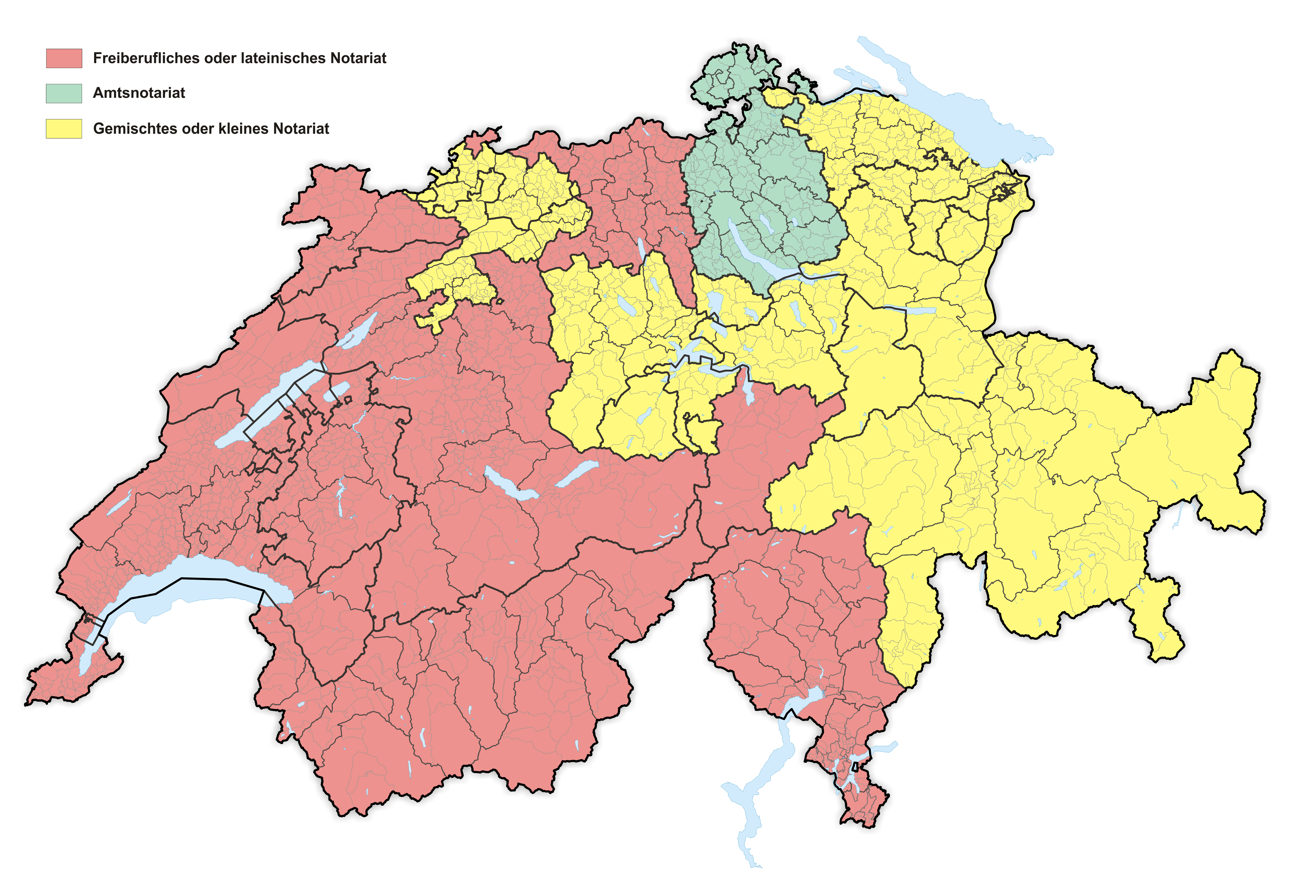 Notariate in der Schweiz